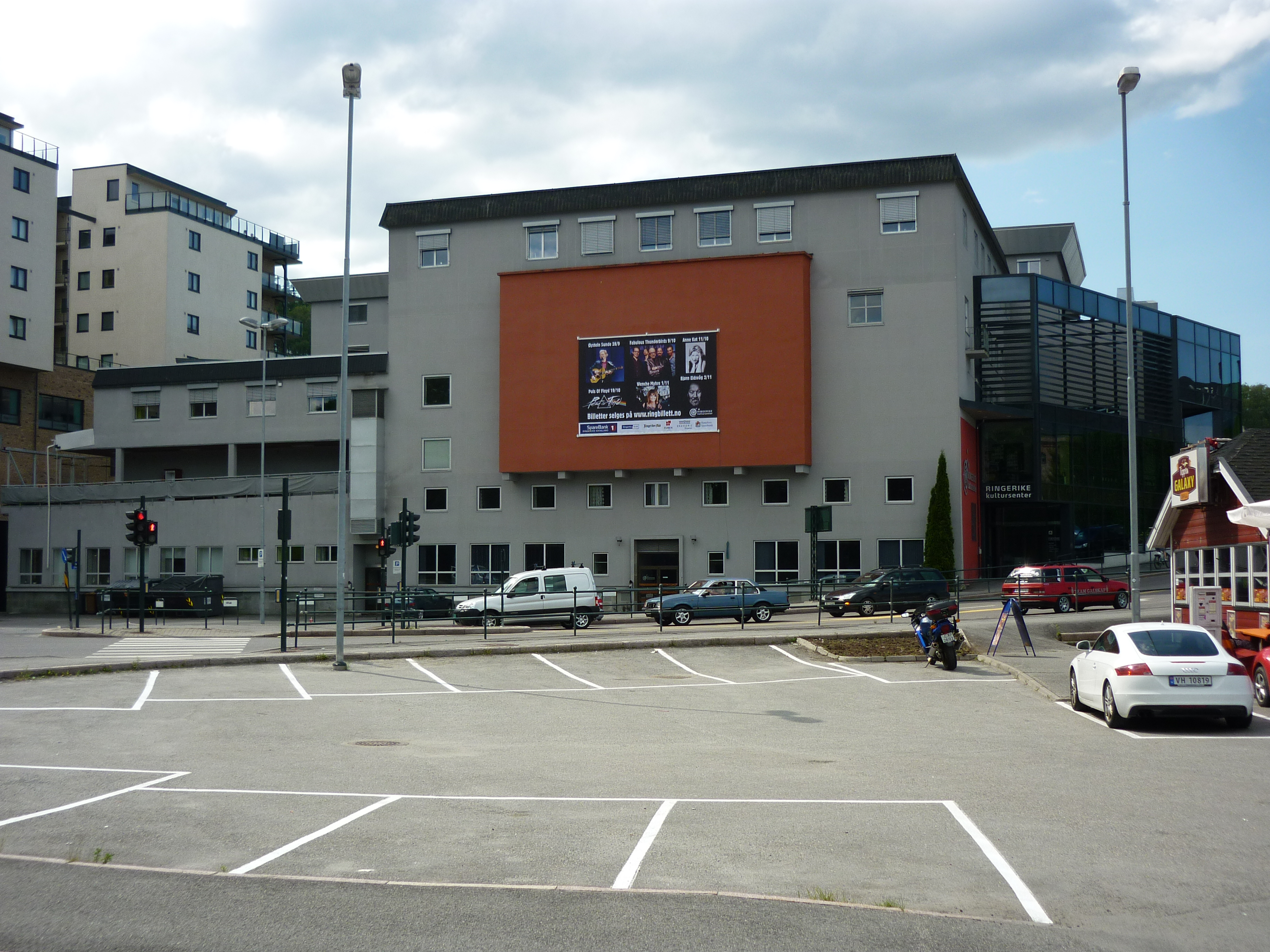 Et næringsbygg i Hønefoss, som blant annet huser NAV, Vinmonopolet og Byscenen.